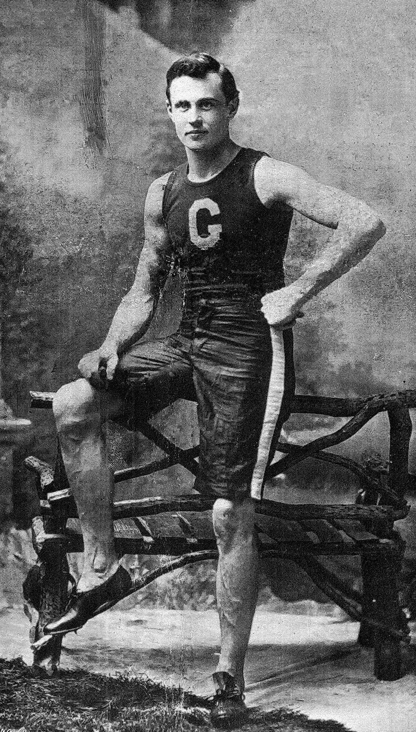 Bernard Wefers